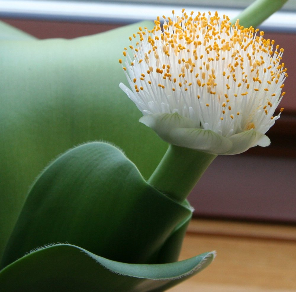 Haemanthus albiflos in Blüte